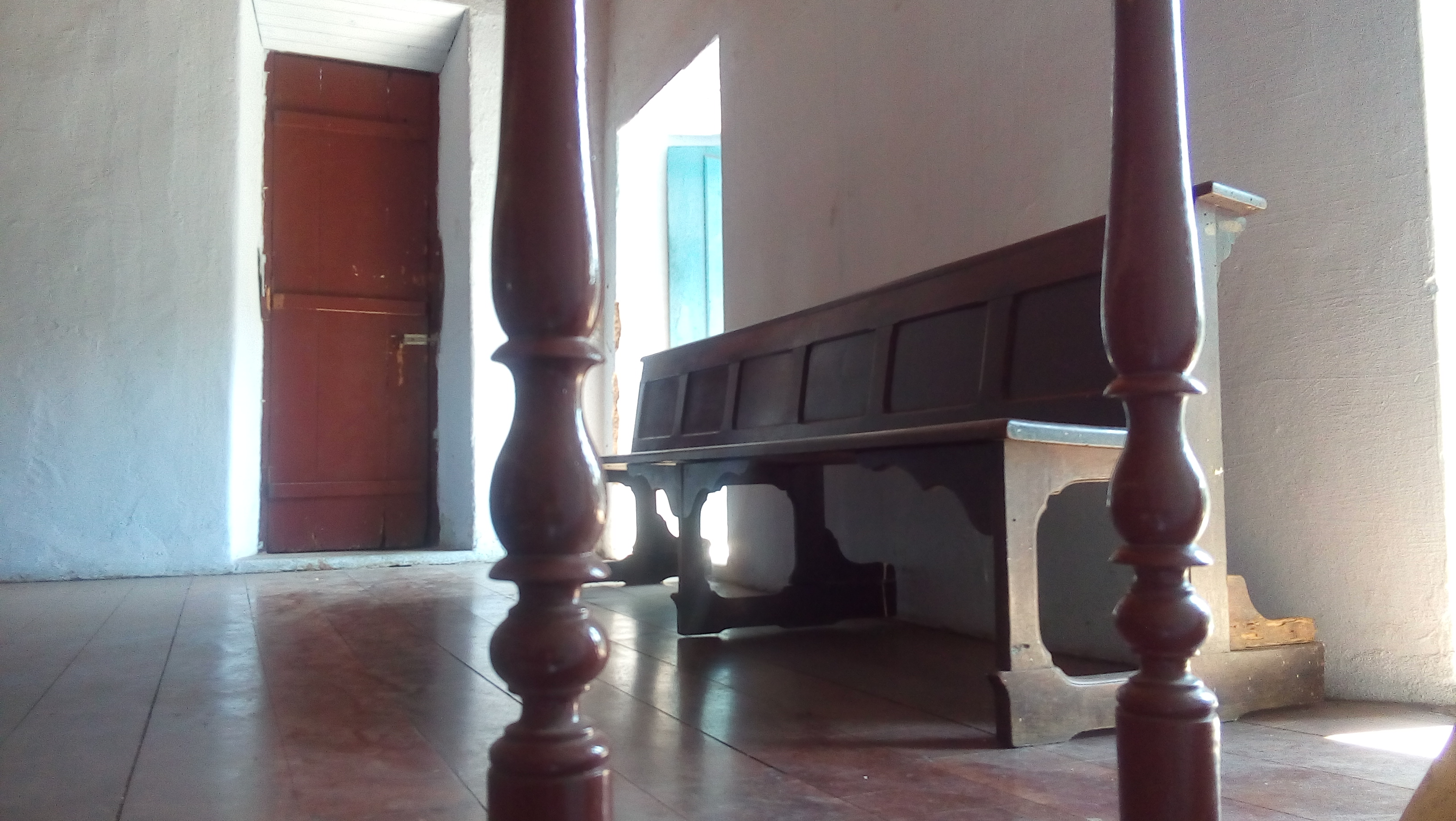 Mezanino da Igreja do Rosário dos Homens Pretos da Penha, em São Paulo (SP), Brasil